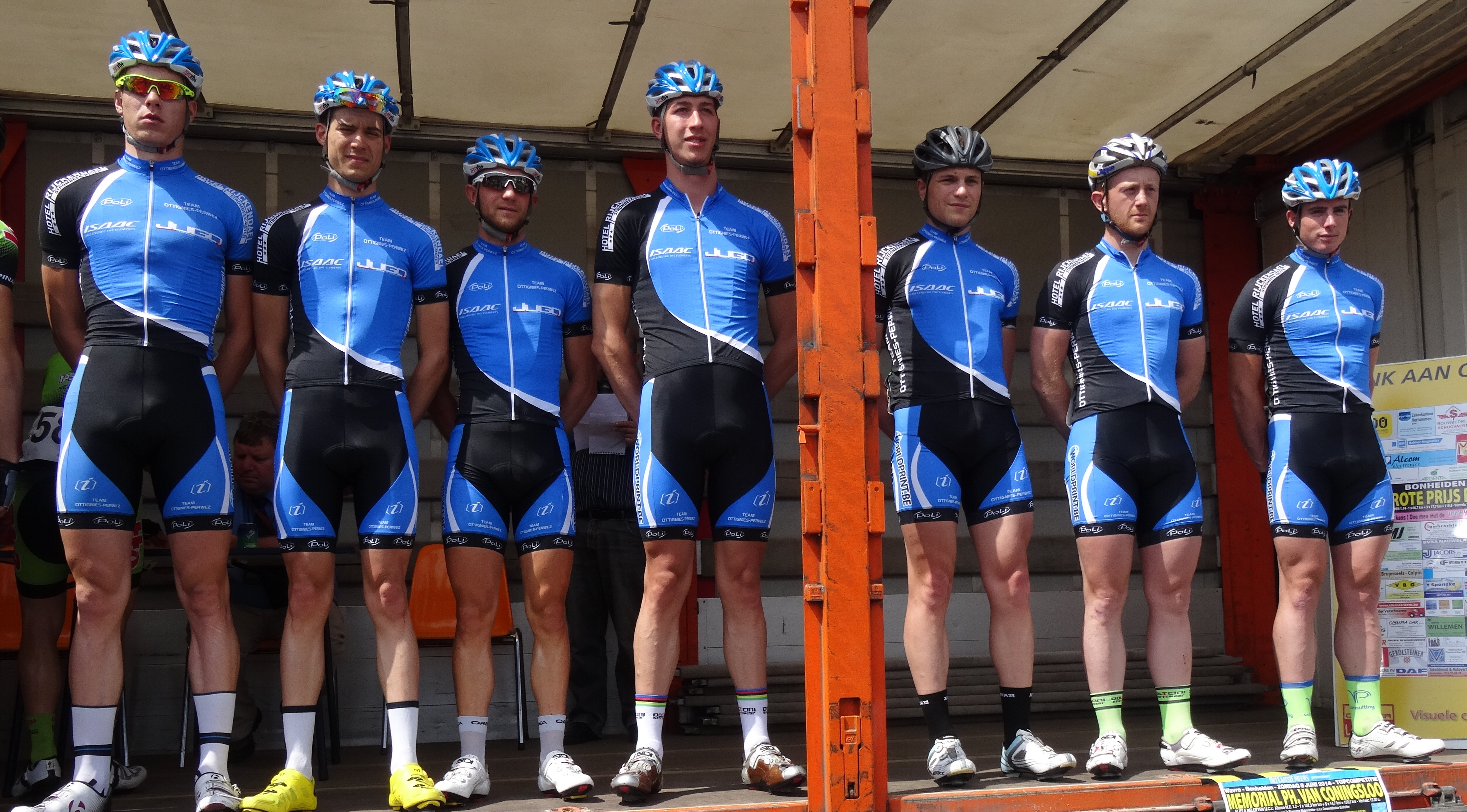 Reportage photographique réalisé le dimanche 8 juin à l'occasion du départ du Mémorial Philippe Van Coningsloo 2014 à Wavre, Belgique.